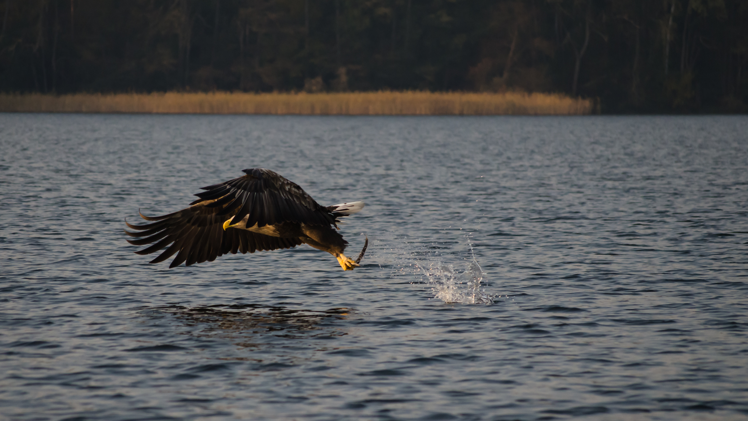 Seeadler raubt Aal